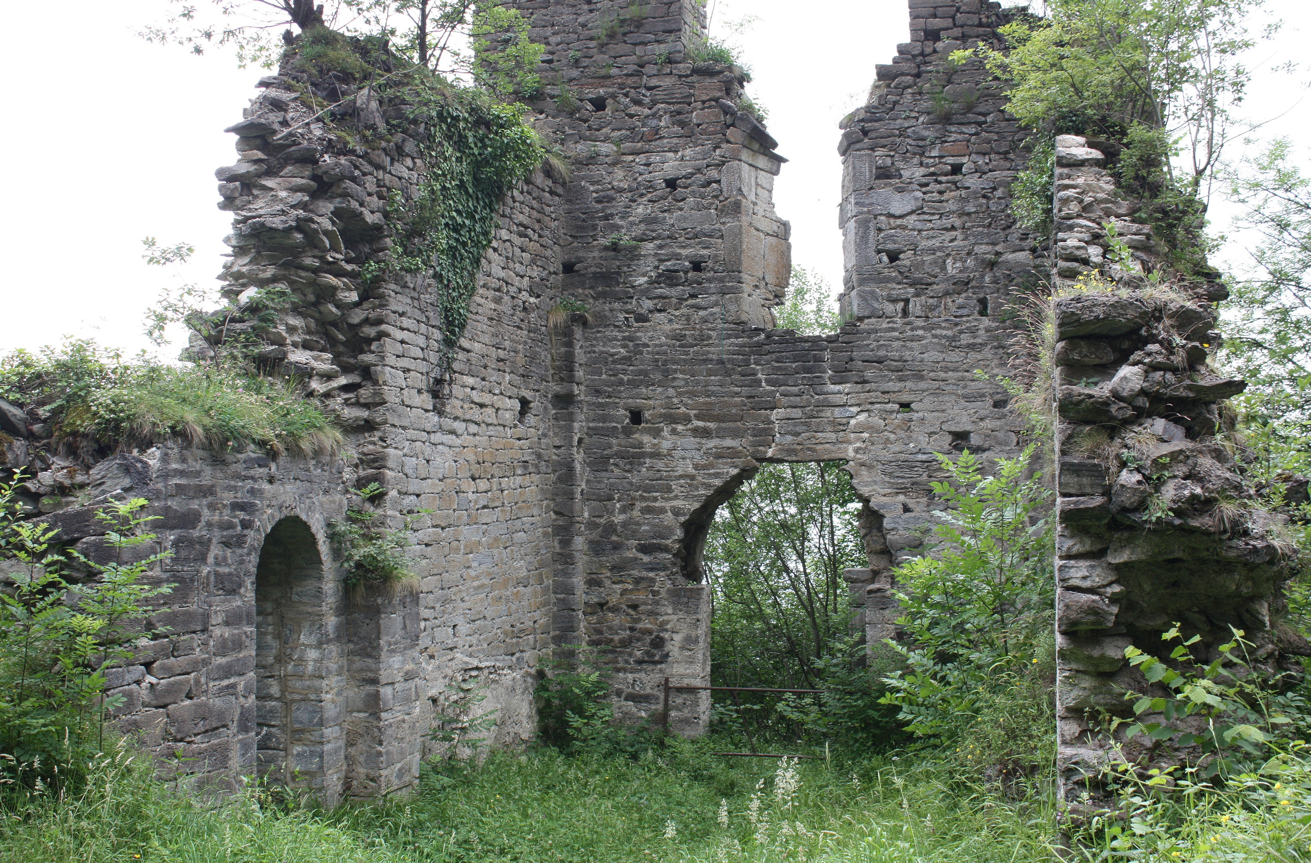 Villelongue - Ancien prieuré Saint-Orens en Lavedan